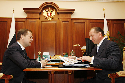 МОСКВА, КРЕМЛЬ. С губернатором Самарской области Владимиром Артяковым.